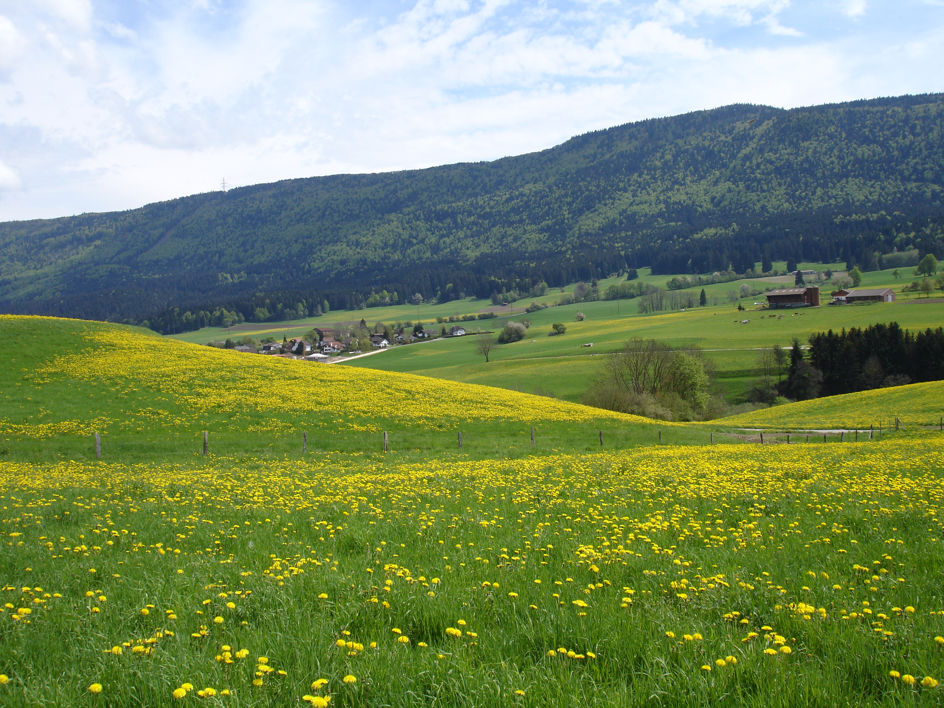 Une vue sur Malleray depuis des pâturages de la commune de Pontenet